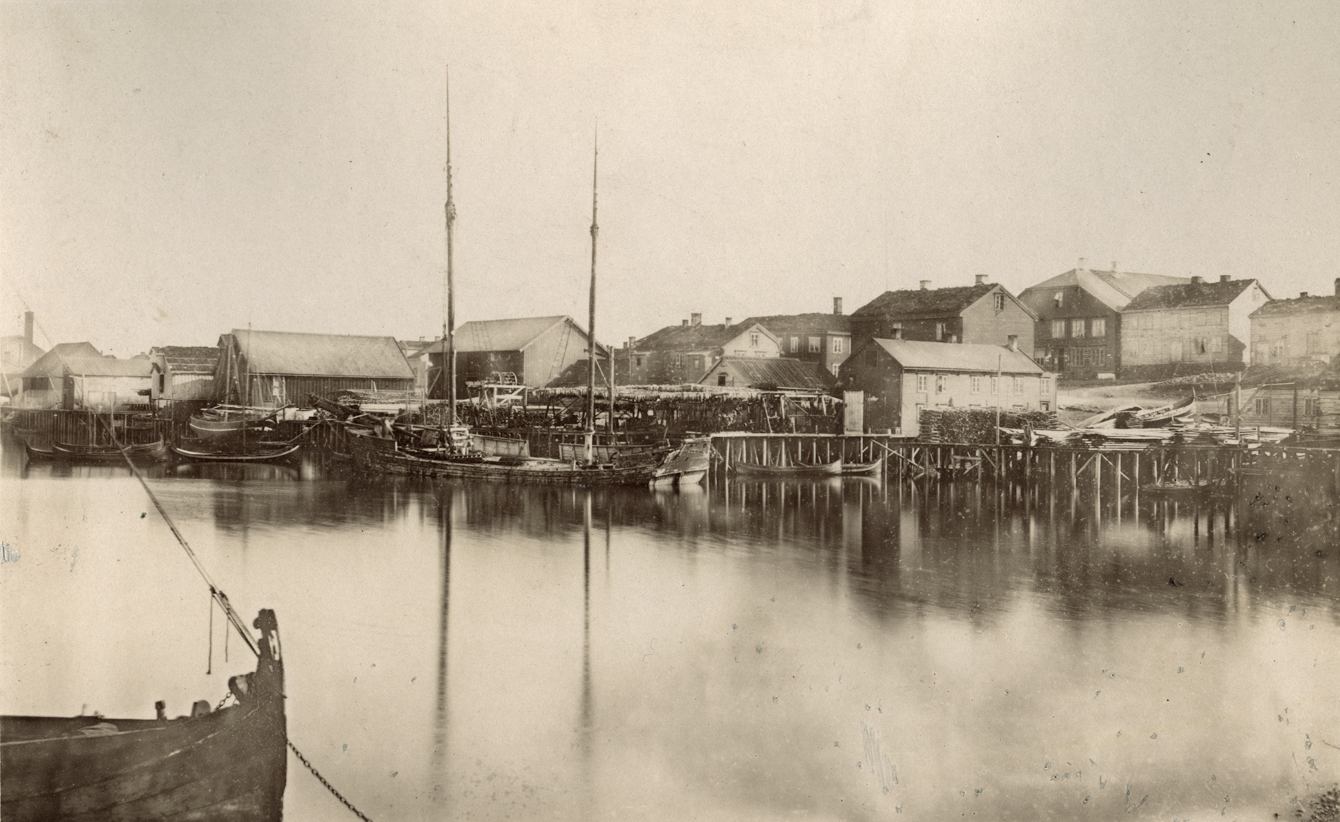 Vardø havn i Vardø by, Finnmark No. 31. Le port de Vardö This image on crowdsourcing geotagging platform Fotodugnad